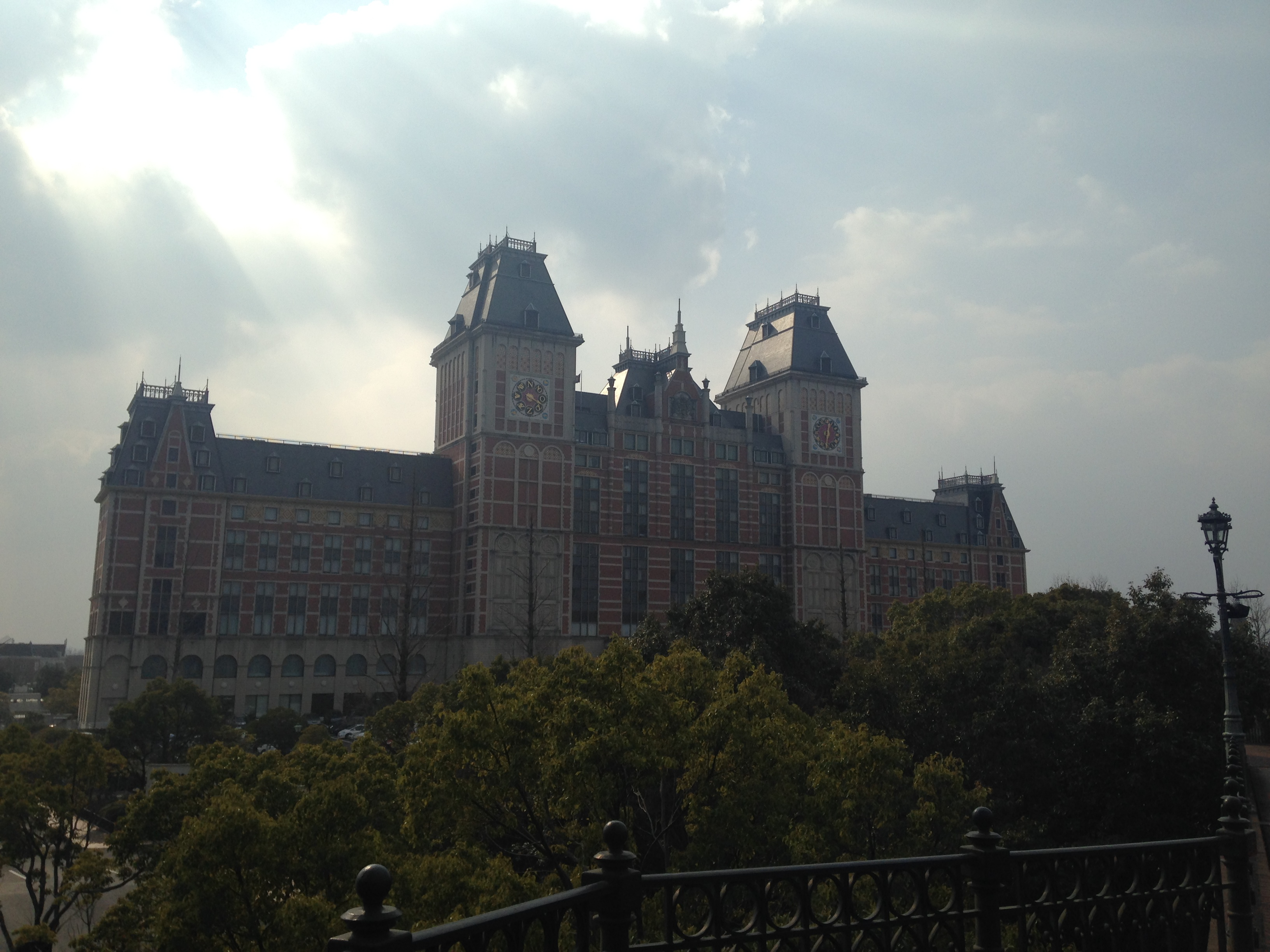 ハウステンボス駅前の橋より望むホテルオークラJRハウステンボス